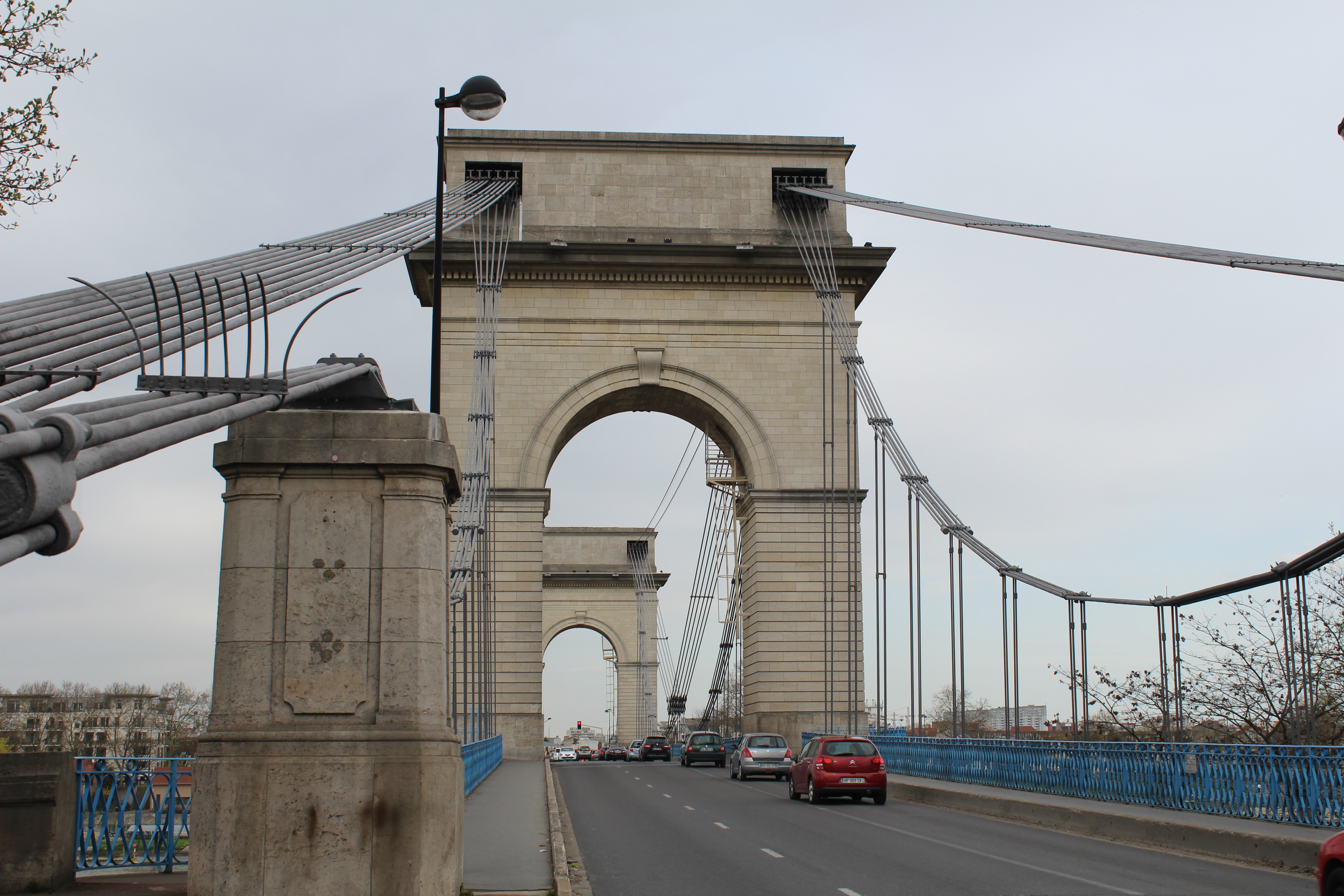 Pont du Port à l'Anglais, côté de Vitry-sur-Seine.